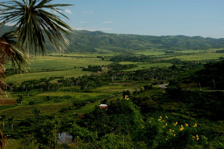 Cuba, september 2005, info in de Metadata